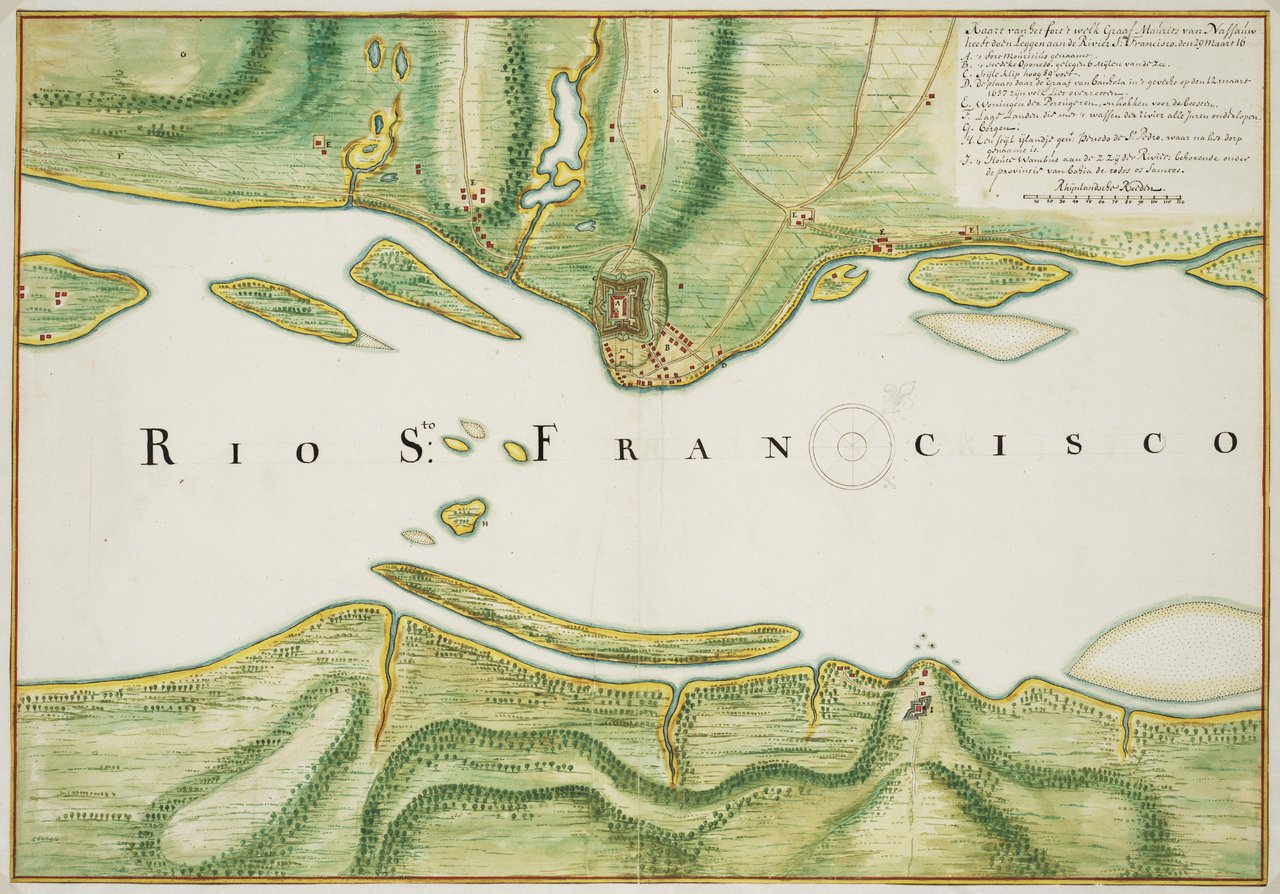 Kaart van het fort 't welk graaf Maurits van Nassauw heeft doen leggen aan de rivier St. Francisco den 29 maart 16.